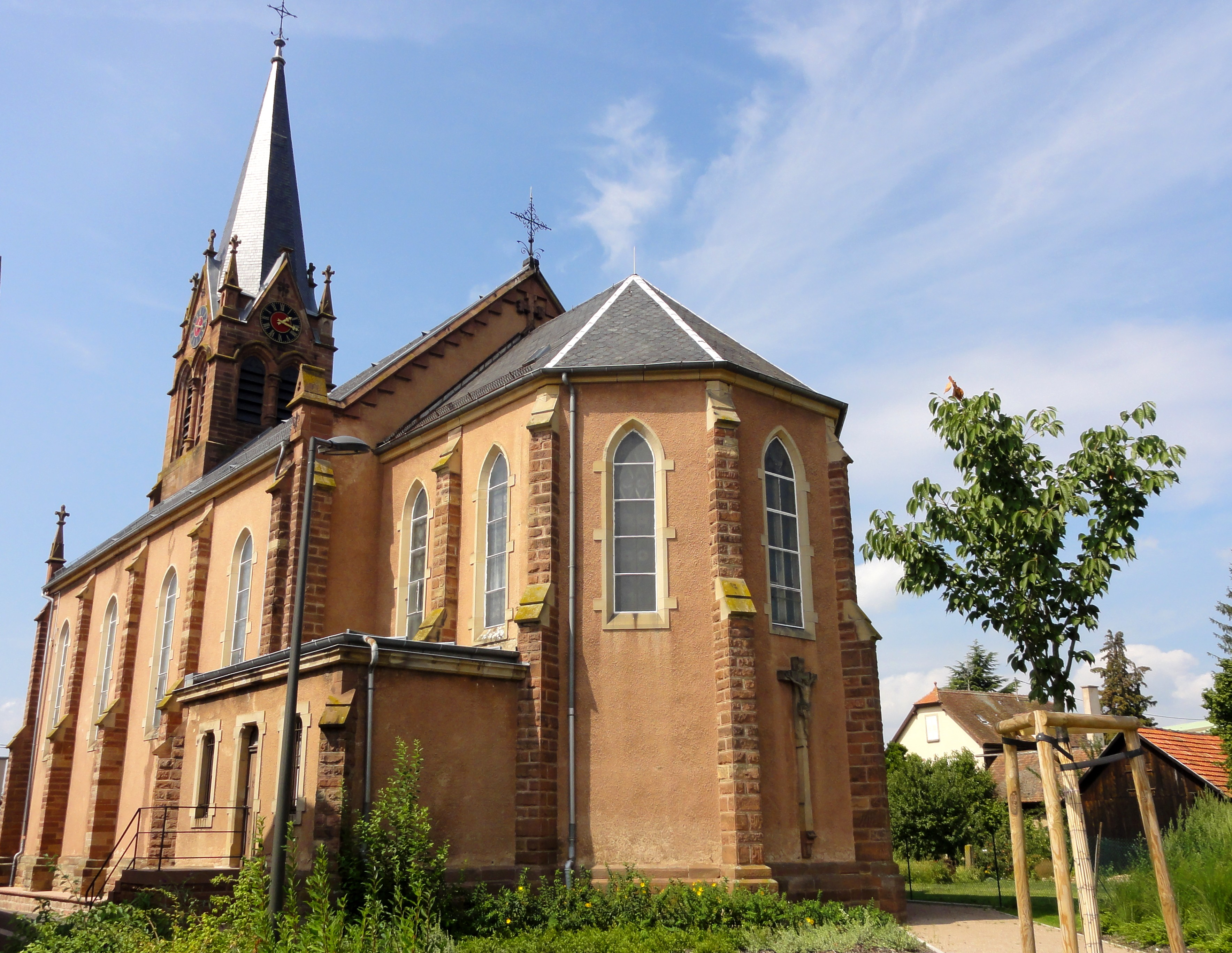 Alsace, Bas-Rhin, Wiwersheim, Église Saint-Cyriaque (IA67001024).